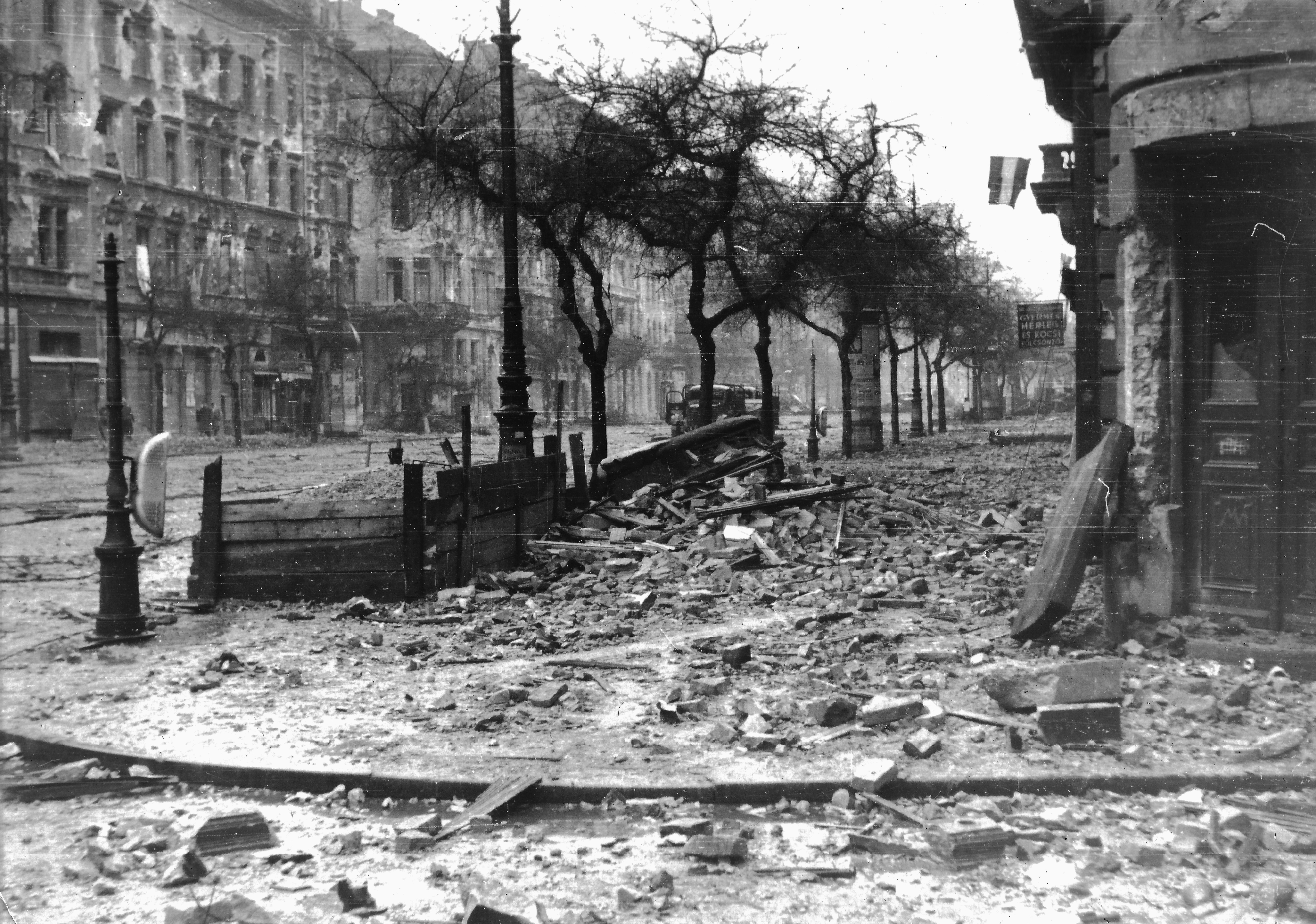 József körút a Csepreghy utca torkolatától a Nap utca felé nézve. Location: Hungary, Budapest VIII. Tags: commercial vehicle, trash can, revolution, flag, Budapest Title: József körút a Csepreghy utca torkolatától a Nap utca felé nézve.